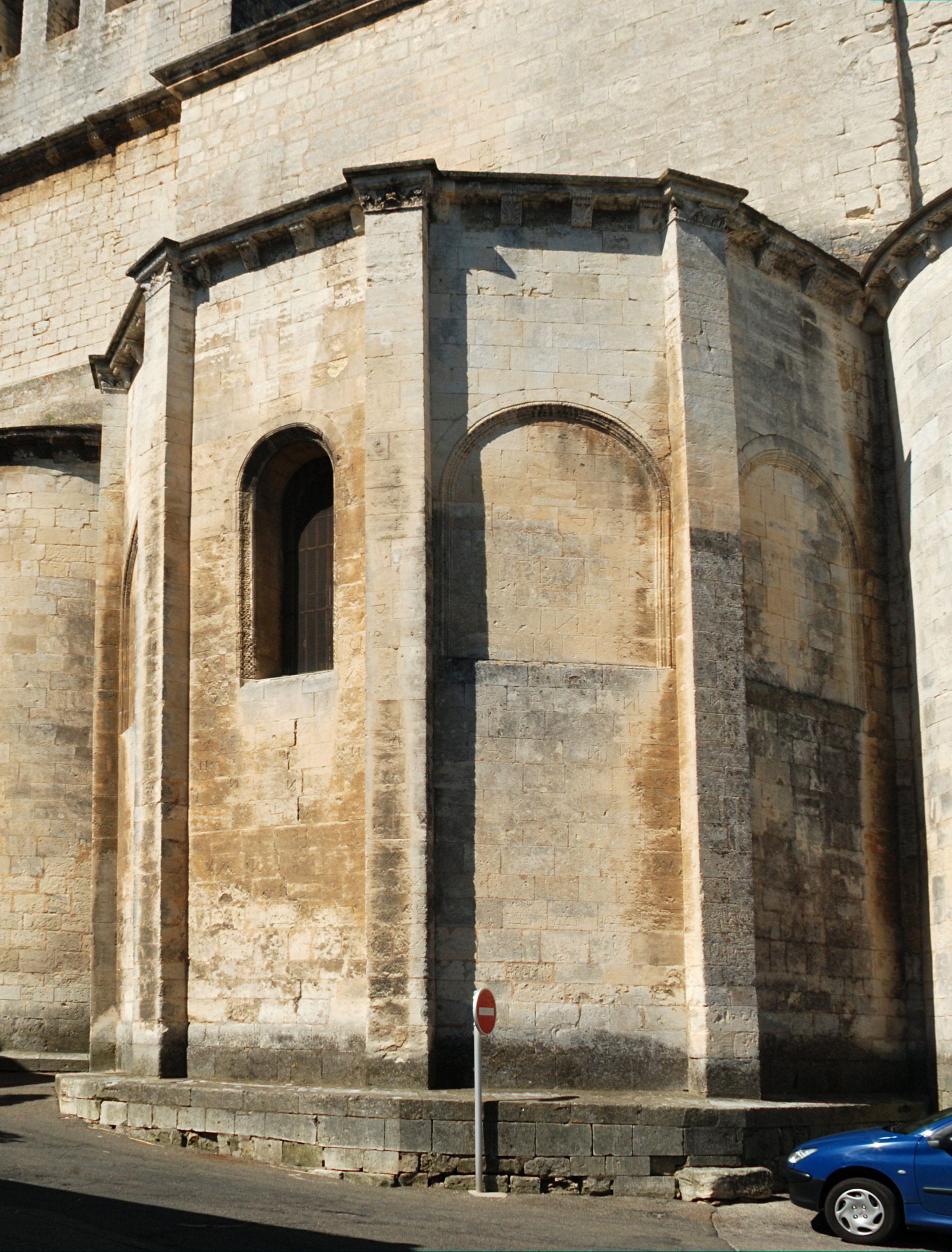 France - Drôme - Saint-Paul-Trois-Châteaux - Cathédrale